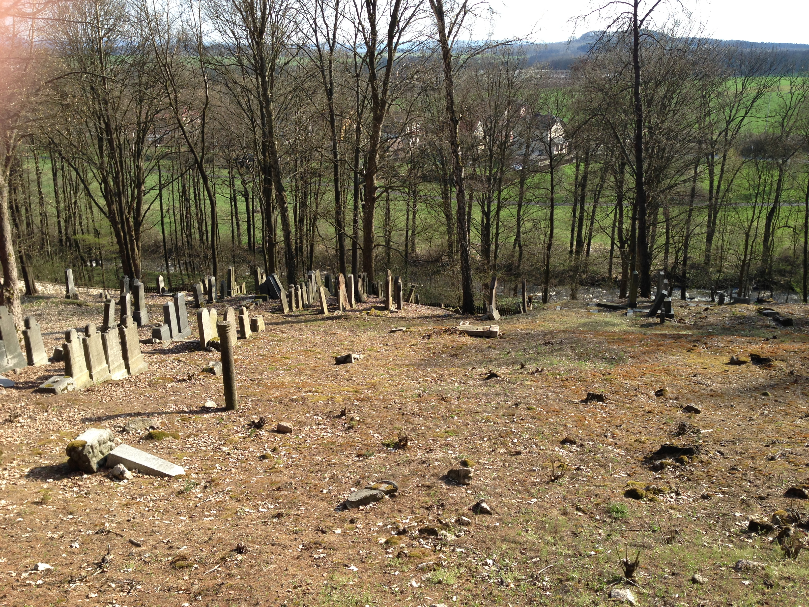 Židovský hřbitov (Hroznětín), 1 km SZ od města, při silnici na Merlín, nad levým břehem Bystřice, Hroznětín